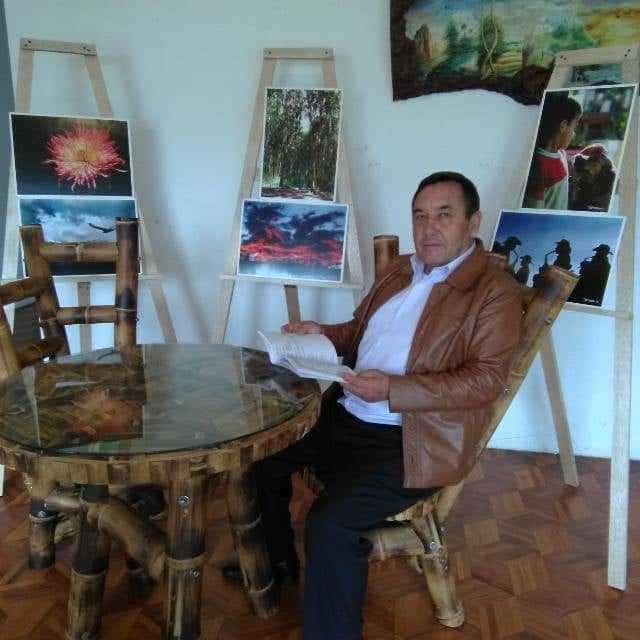 Dr. Amilcar Tapia T. -Escritor, investigador,periodista e historiador carchense (Ecuador)